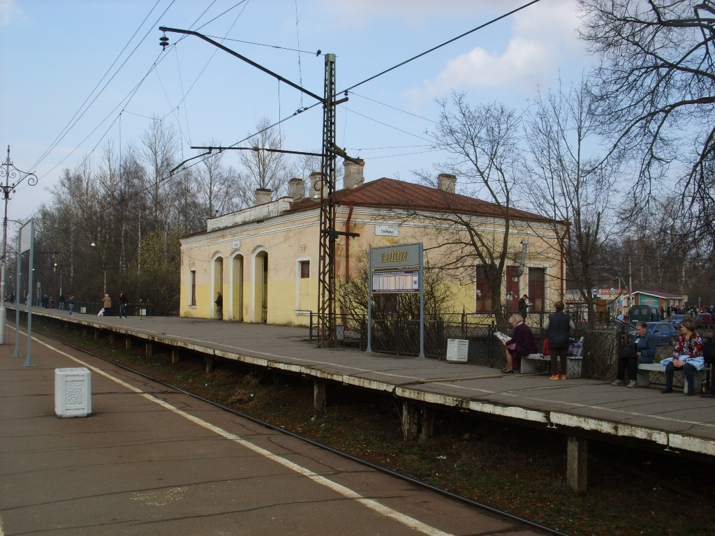 Вид на здание вокзала со второй платформы